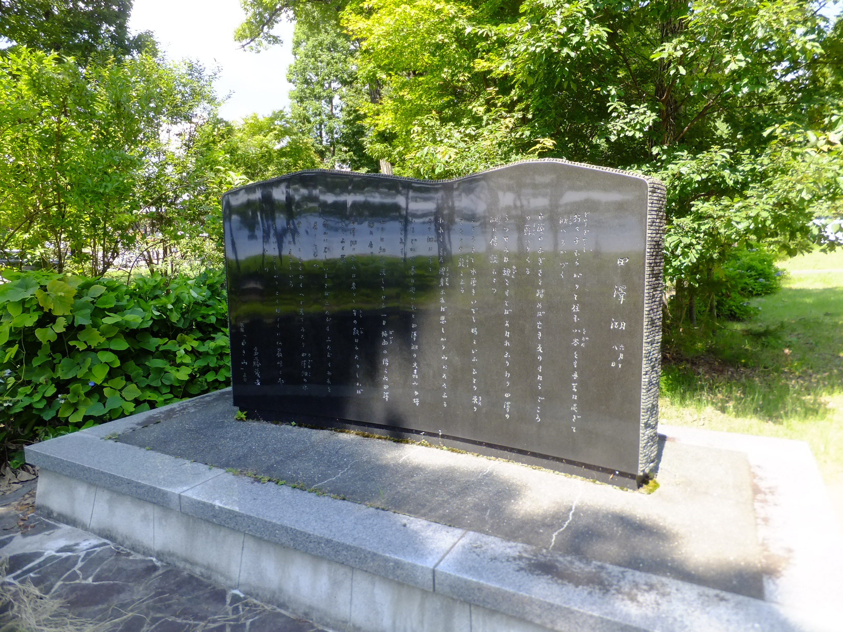 斎藤茂吉の歌碑。田沢湖ハーブガーデンの近くにある。